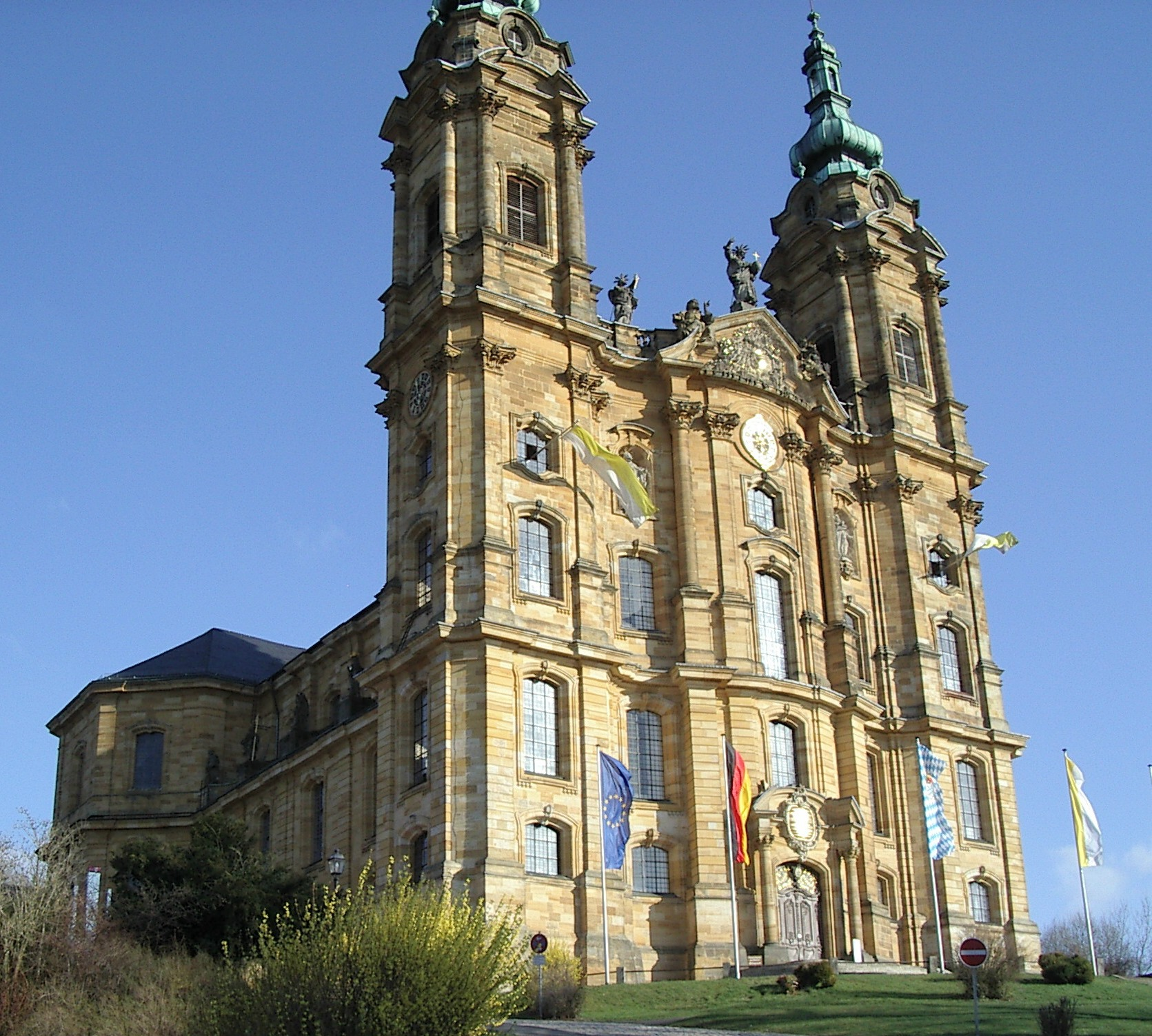 Vierzehnheiligen von Nordwest